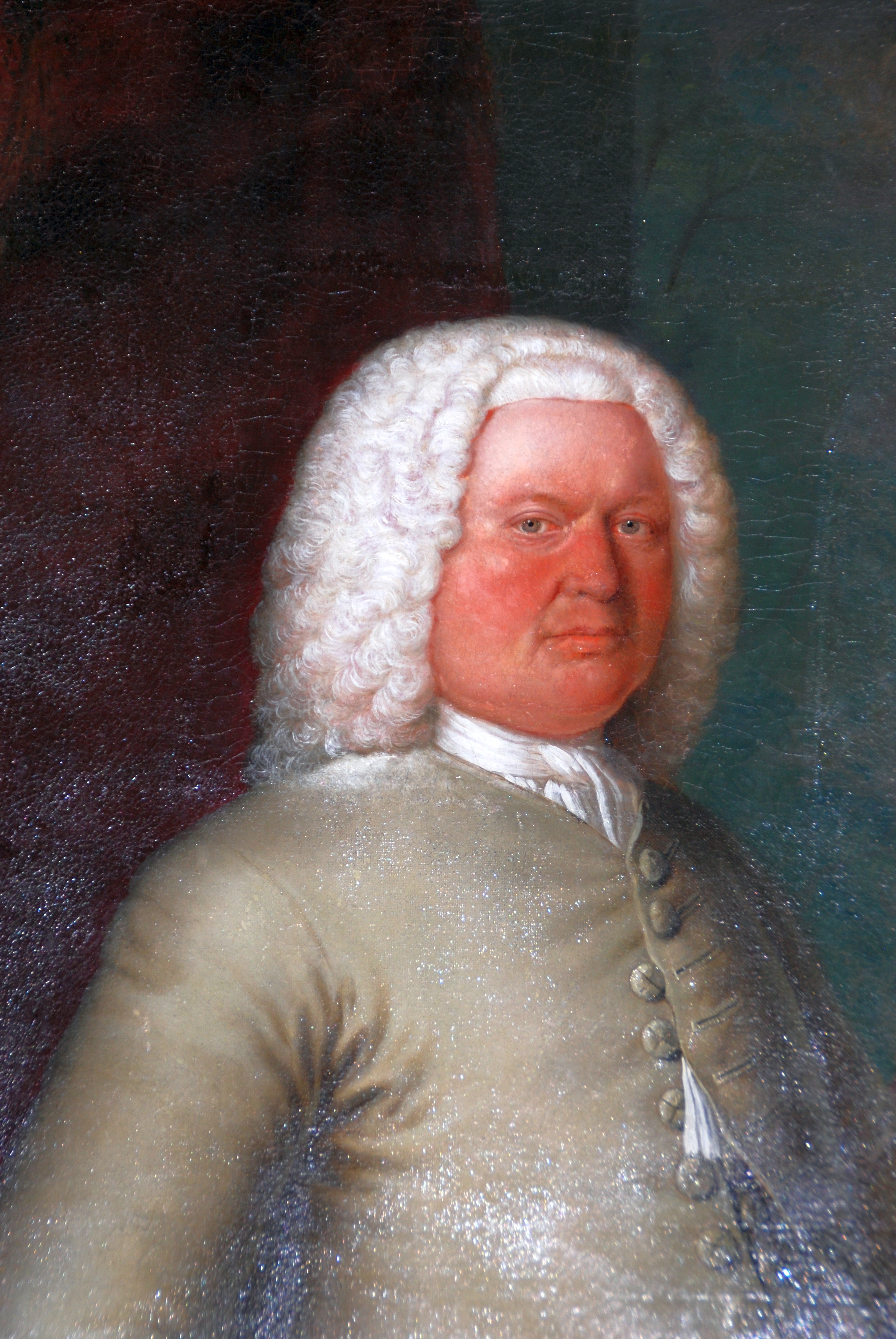 Schindler-Bilder: Gemäde von Severin Schindler